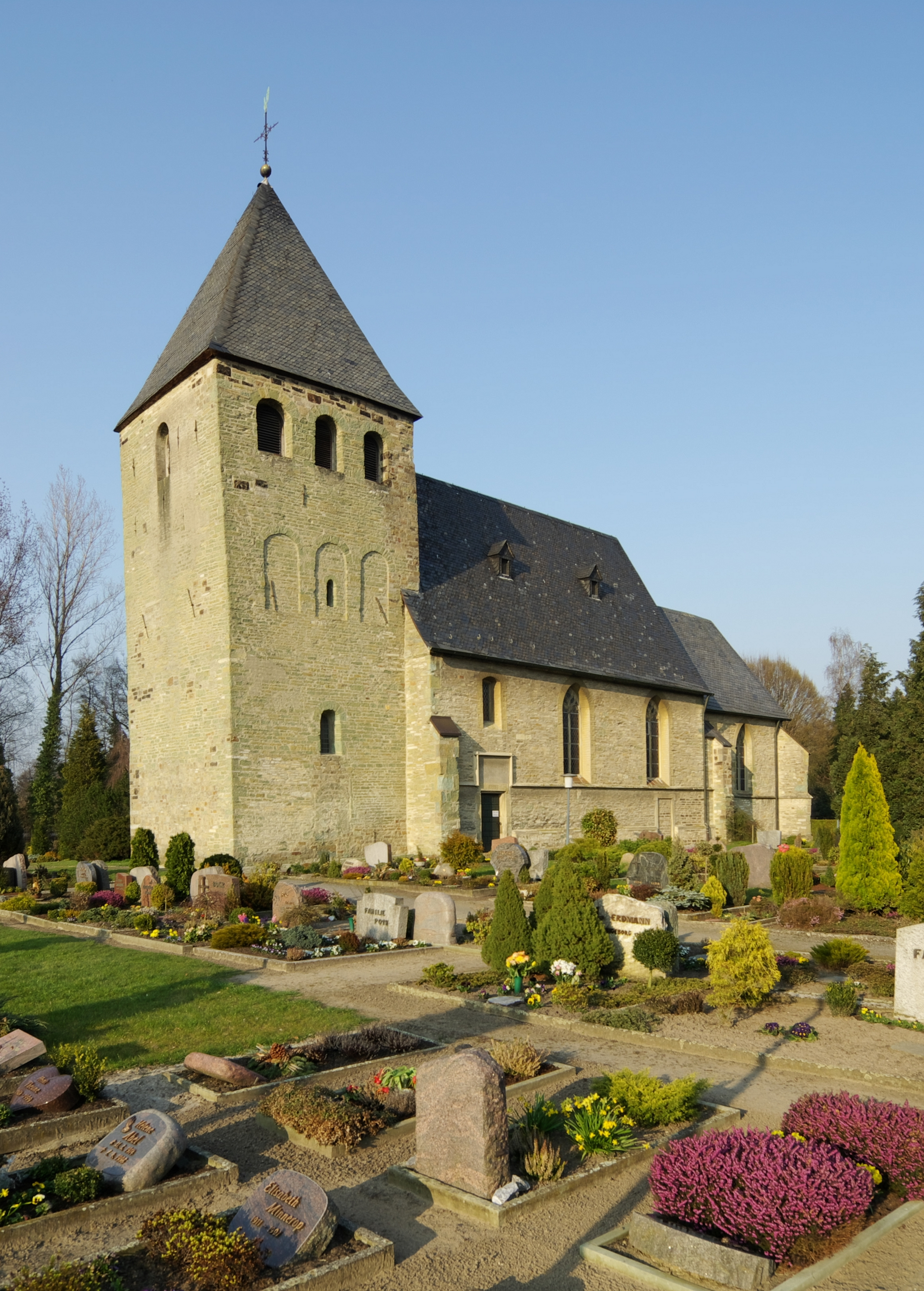 Evangelische Dorfkirche in Uentrop, Hamm, Nordrhein-Westfalen